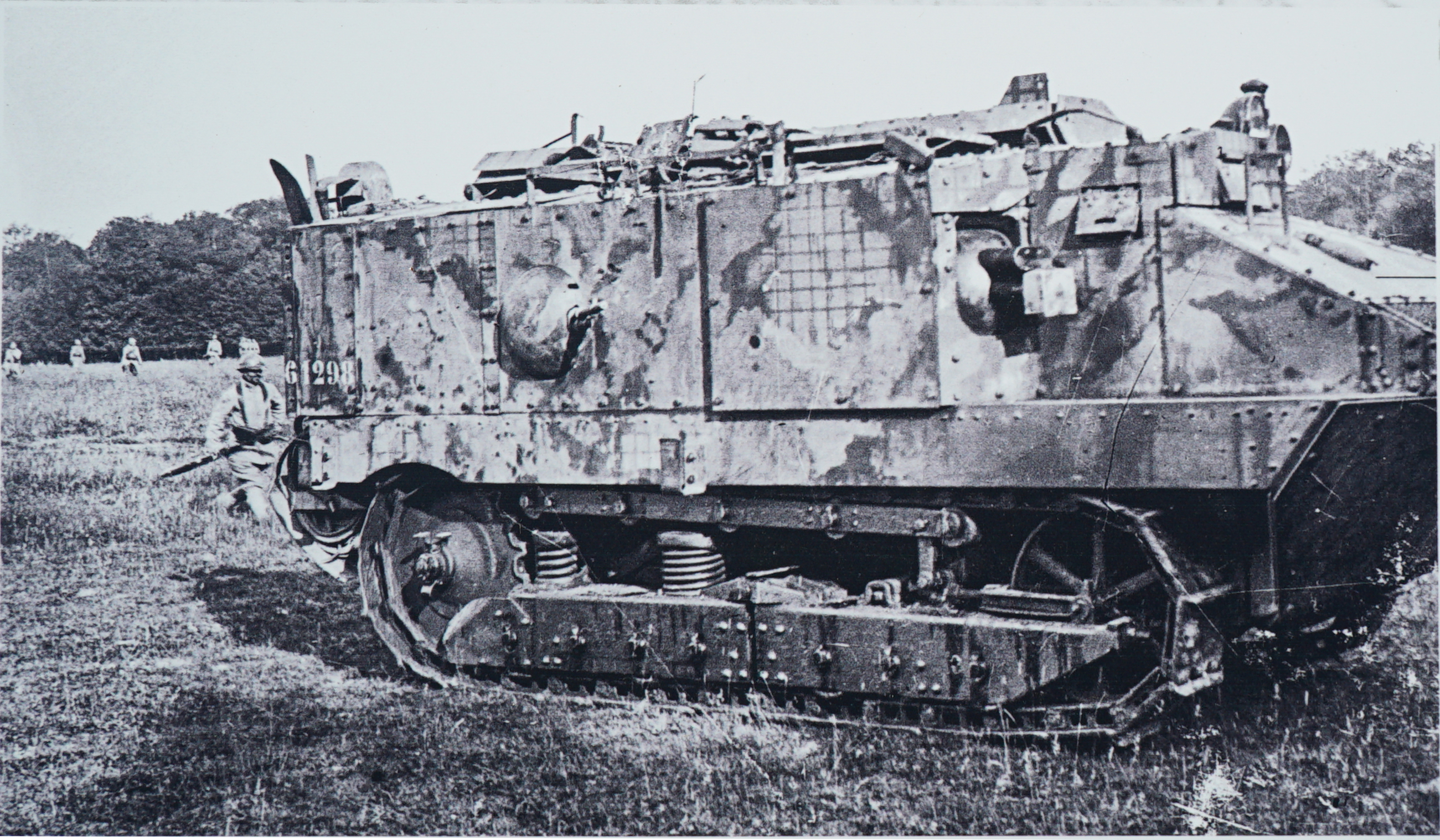 la première guerre mondiale à Berry-au-Bac.